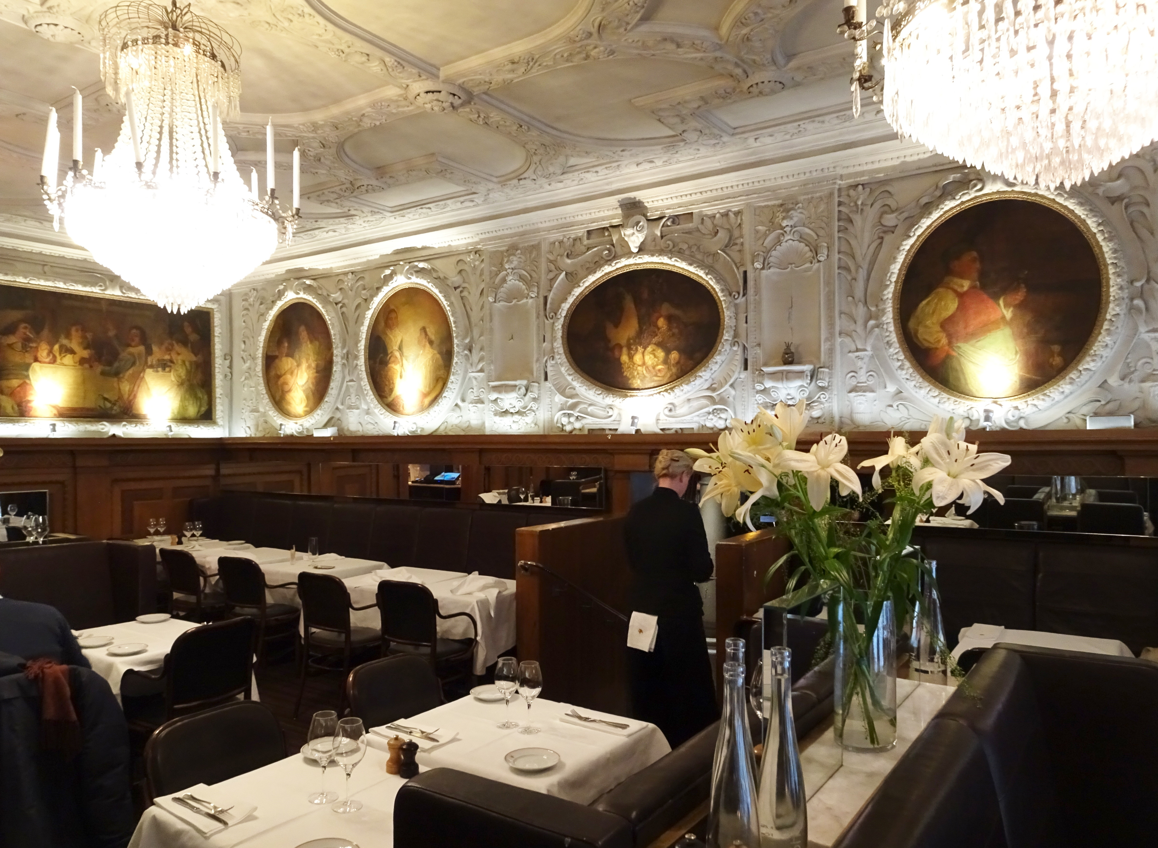 Före detta Restaurant Tattersall, matsal (idag Restaurang Grodan)